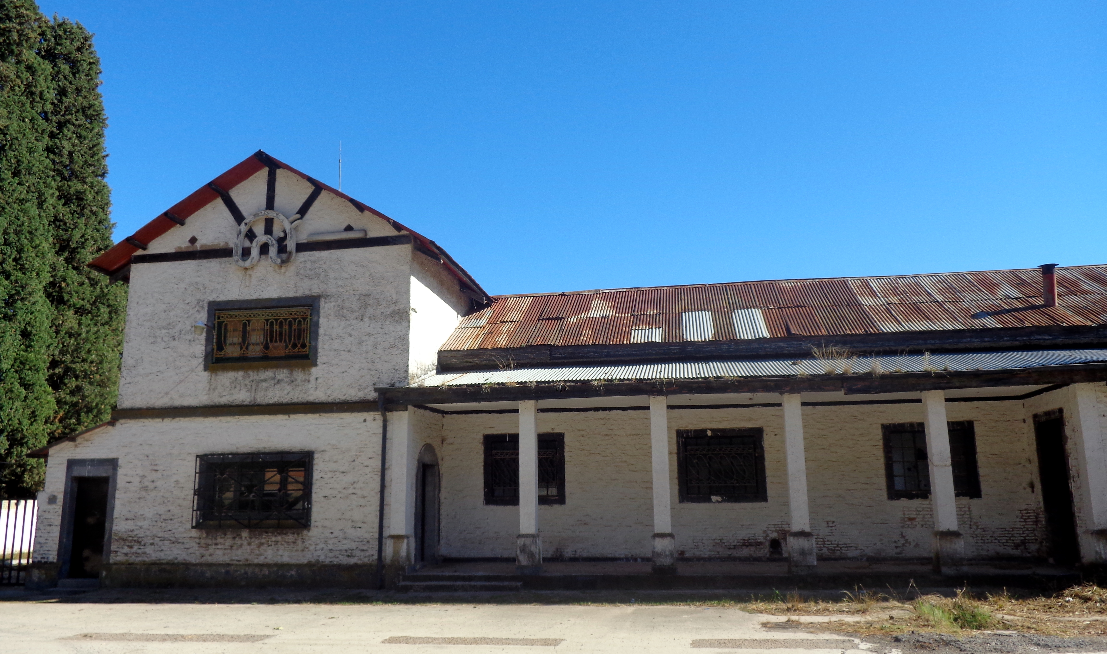 Ruinas de lo que fue la estancia La Martona en Vicente Casares, Provincia de Buenos Aires, Argentina.